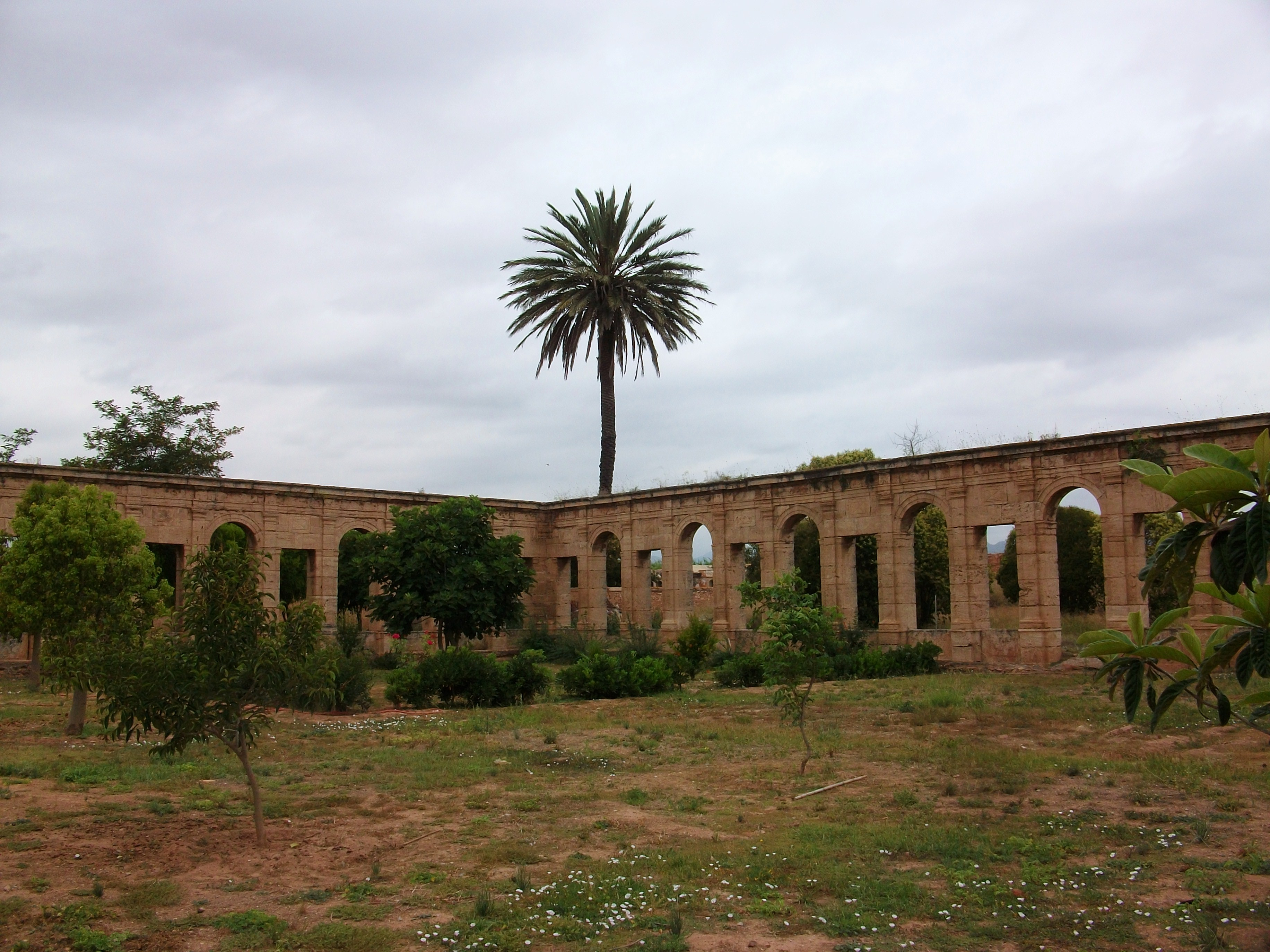 Claustre major de la cartoixa d'Ara Christi.